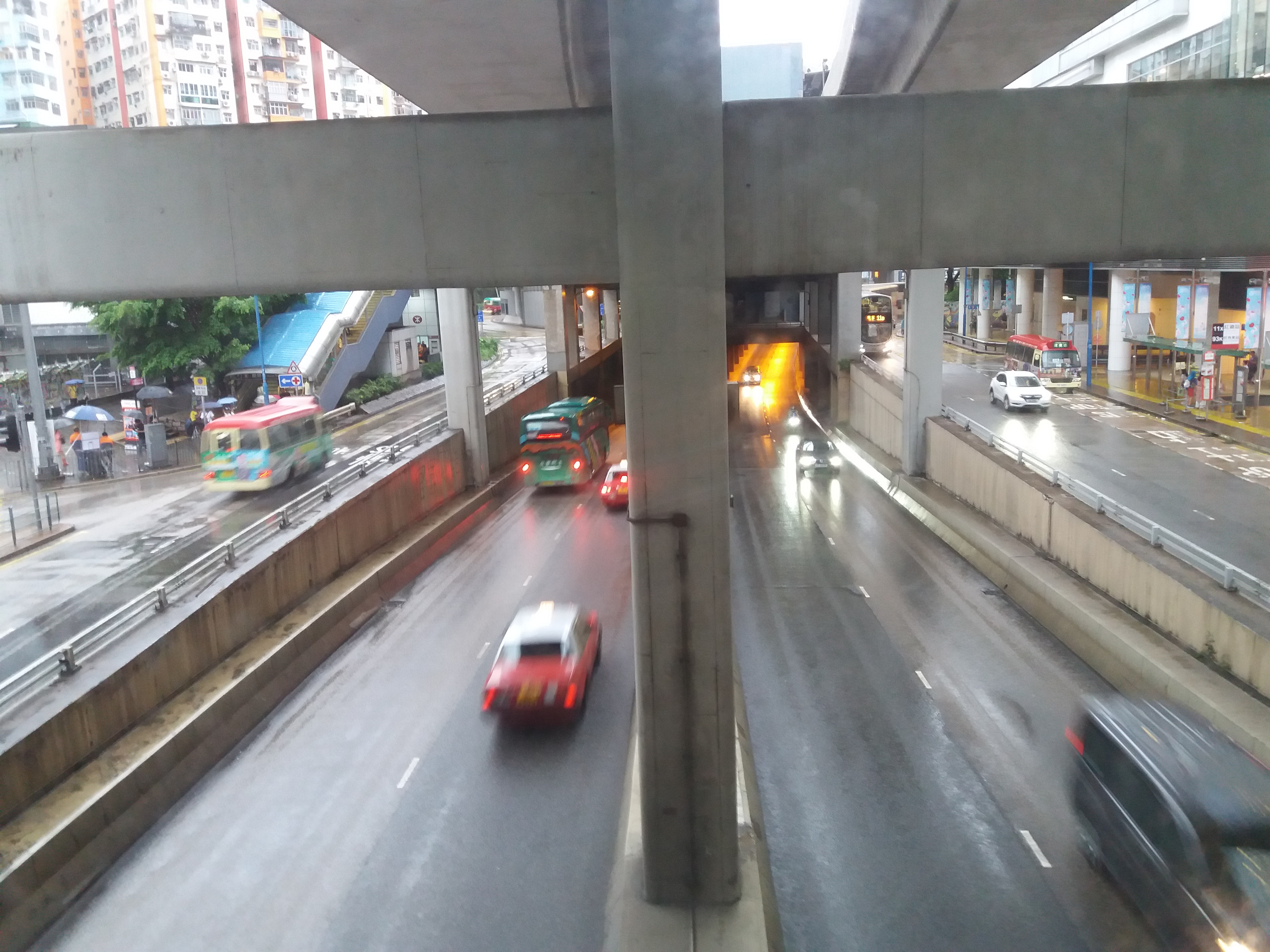 中文（香港）: 觀塘道下通道